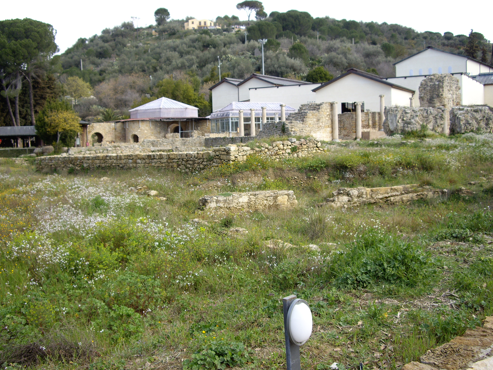 ikuspegi orokorra